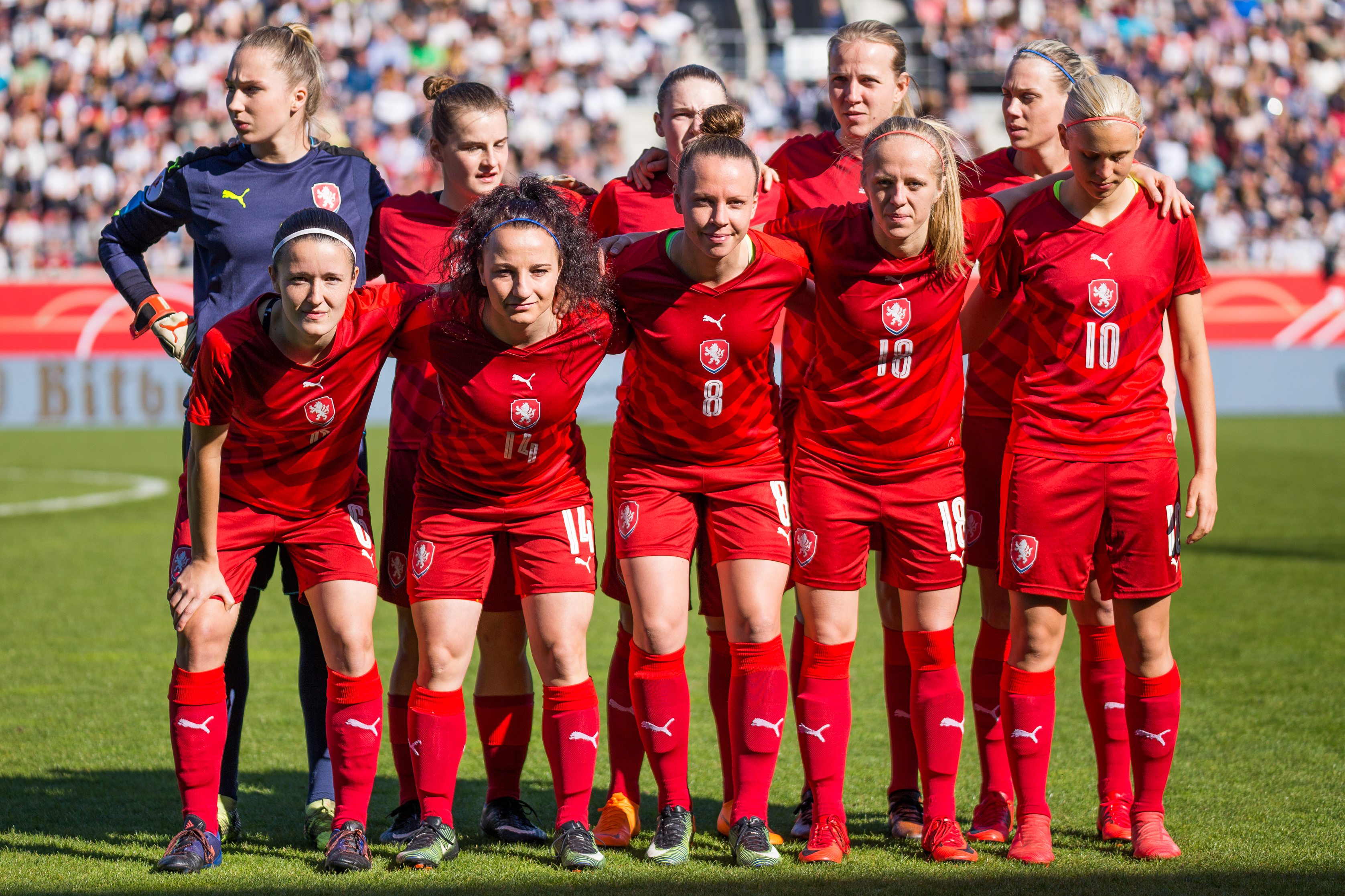 Mannschaftsfoto, Aufstellung, team photo Tschechien (CZE)